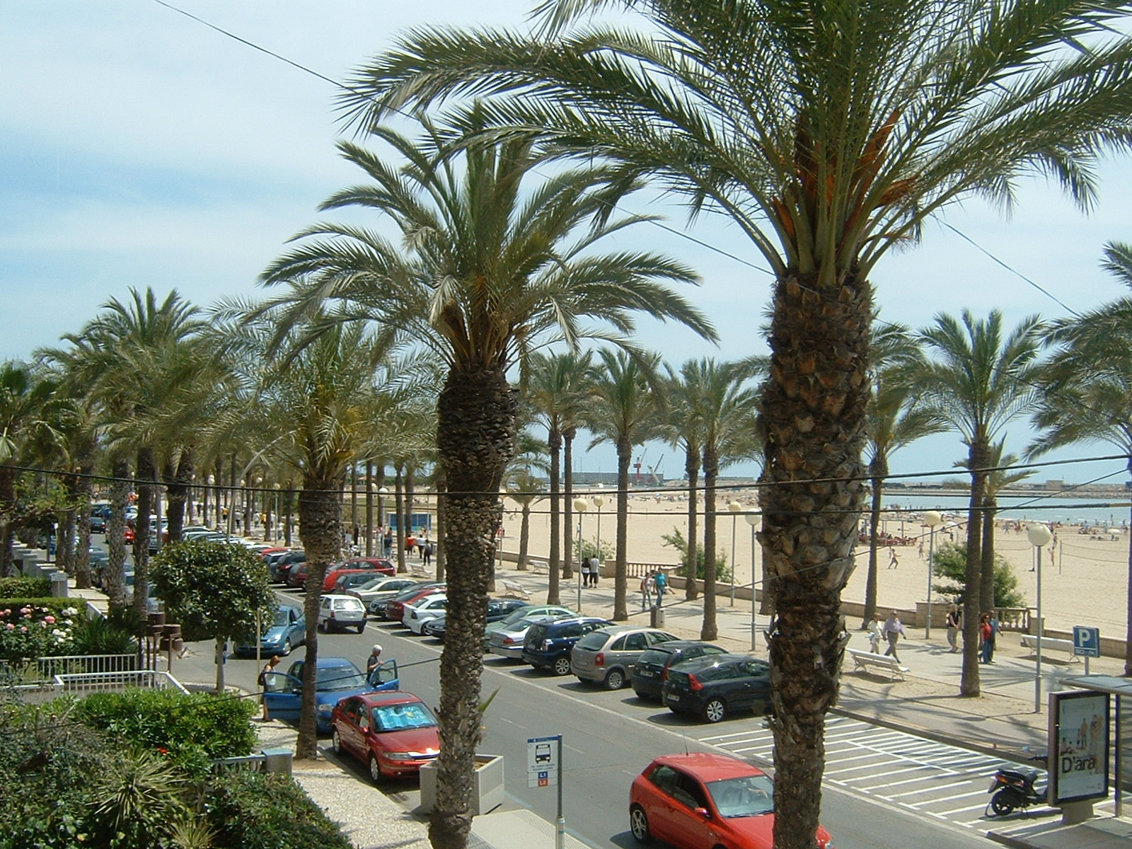 Passeig Maritim de Ribes Roges, Vilanova I La Geltru, Spain